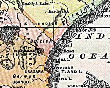 Duits Witu in 1890